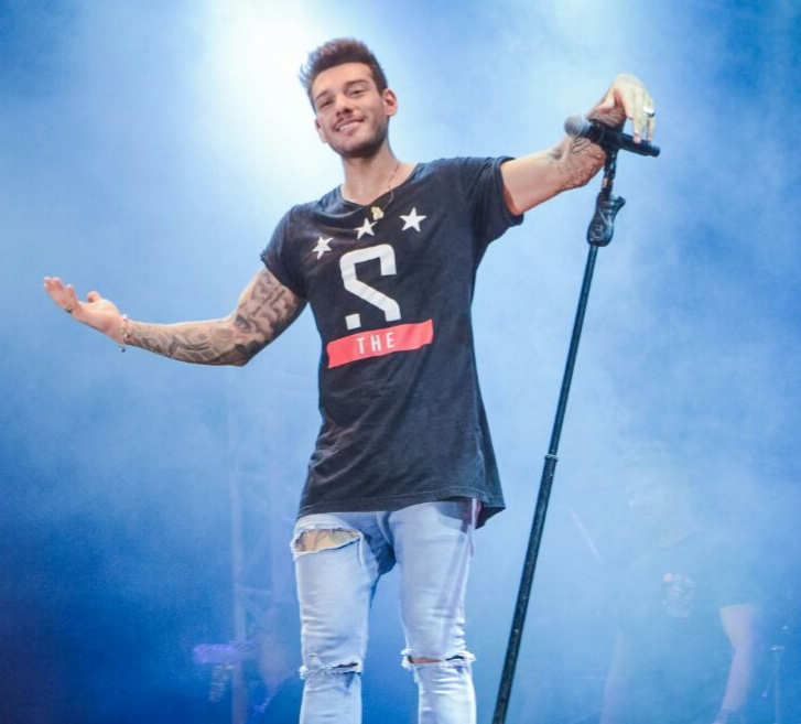 Lucas Lucco se apresenta na Expoacre 2015 Foto: Junior Aguiar/Secom